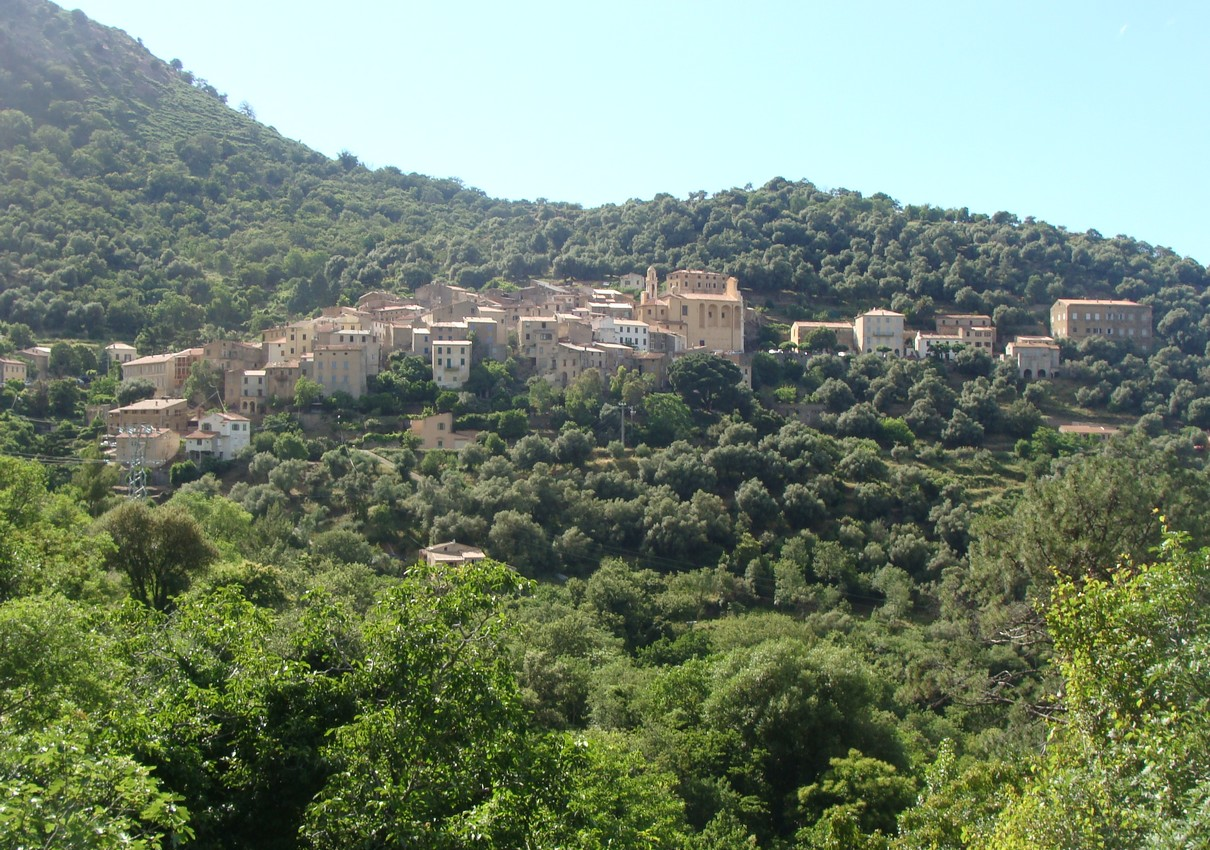 Vue de Muro (Haute-Corse).